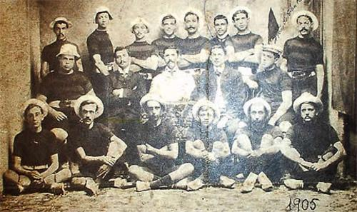 Foto da equipe do Sport (1905)